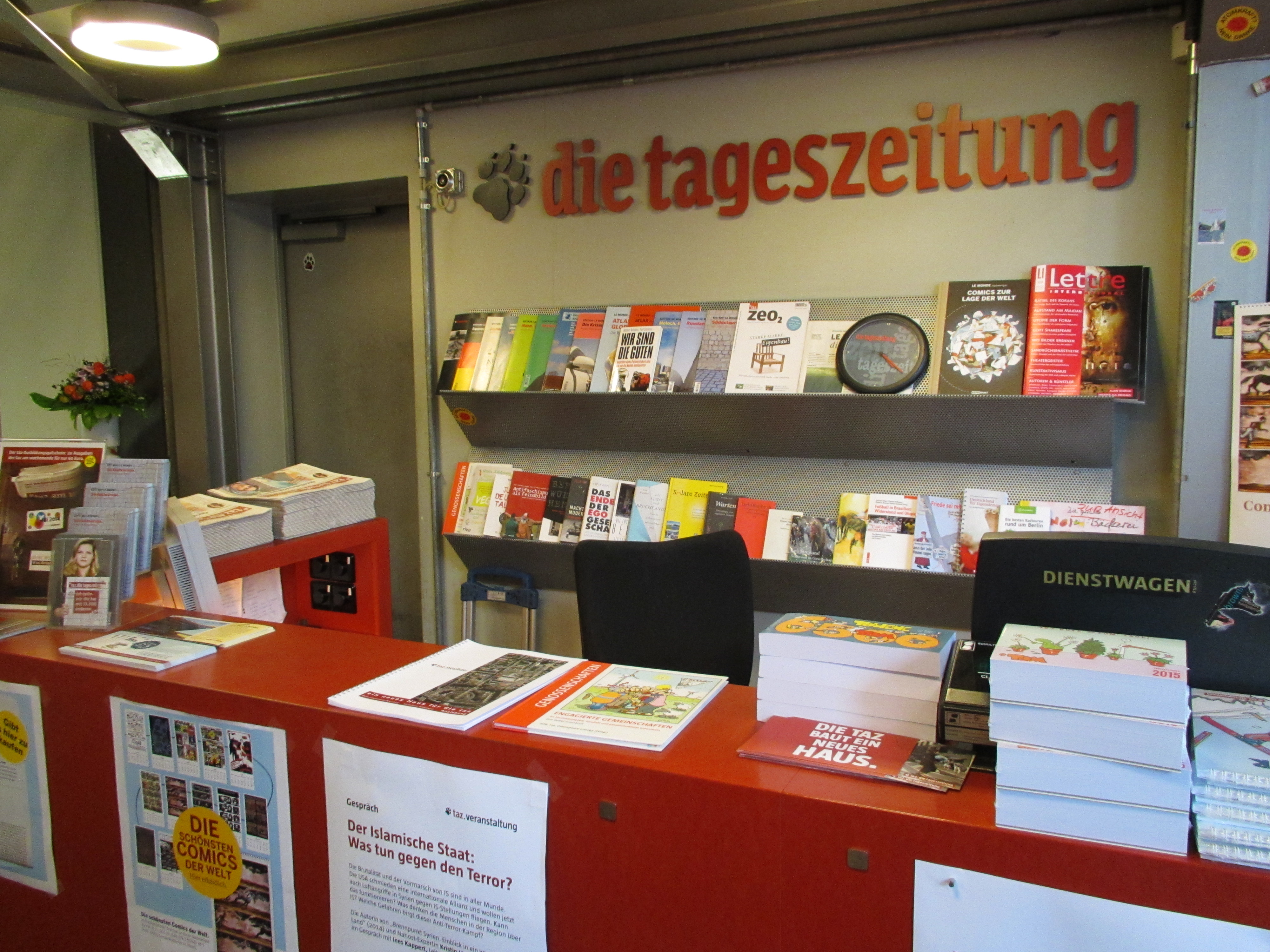 taz--Die-Tageszeitung-Shop-Rudi-Berlin-Dutschke-Strasse-25